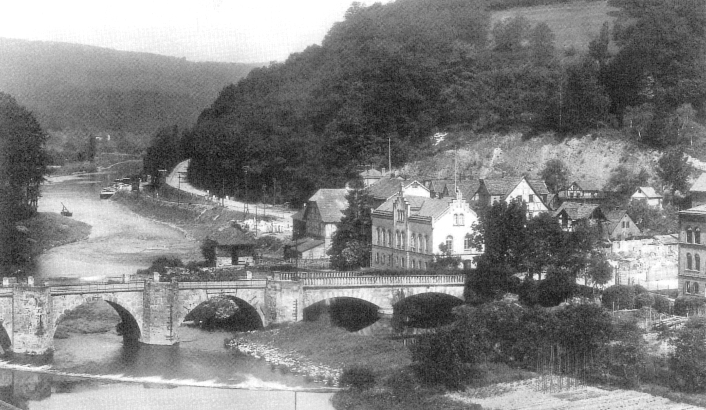 Blume und Alte Werrabrücke